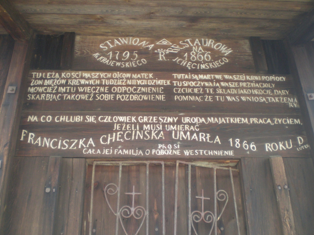 Napis nad wejściem do kaplicy grobowej Krajewskich